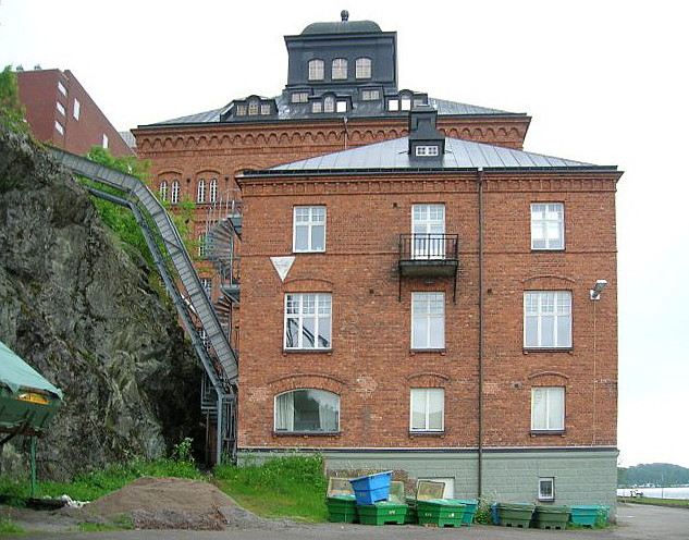 Gamla kontoret (numera bostadshus), Kvarnholmen, Nacka, Sweden